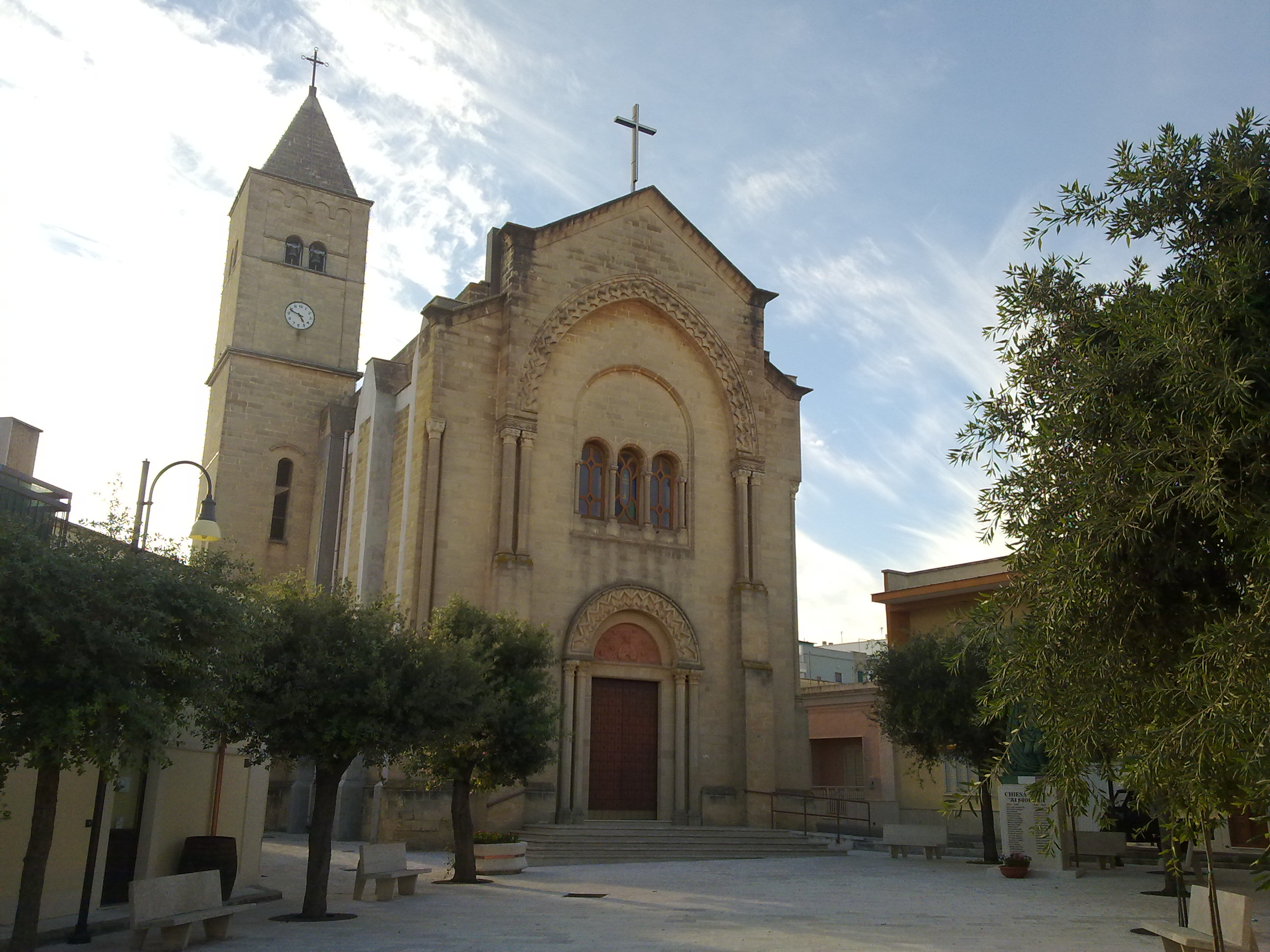 Chiesa dell'Immacolata Chiesanuova, Lecce